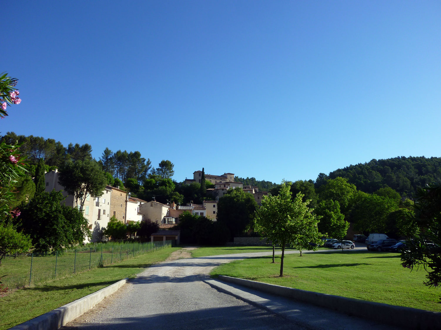 Le village vu du parking de l’église